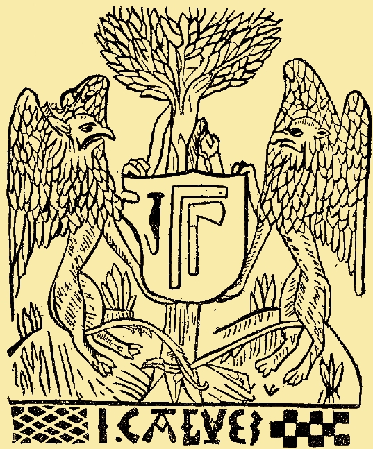 Marque de l'imprimeur Jehan Calvez, sur l'édition de 1499 du Catholicon de Jehan Ladadeuc